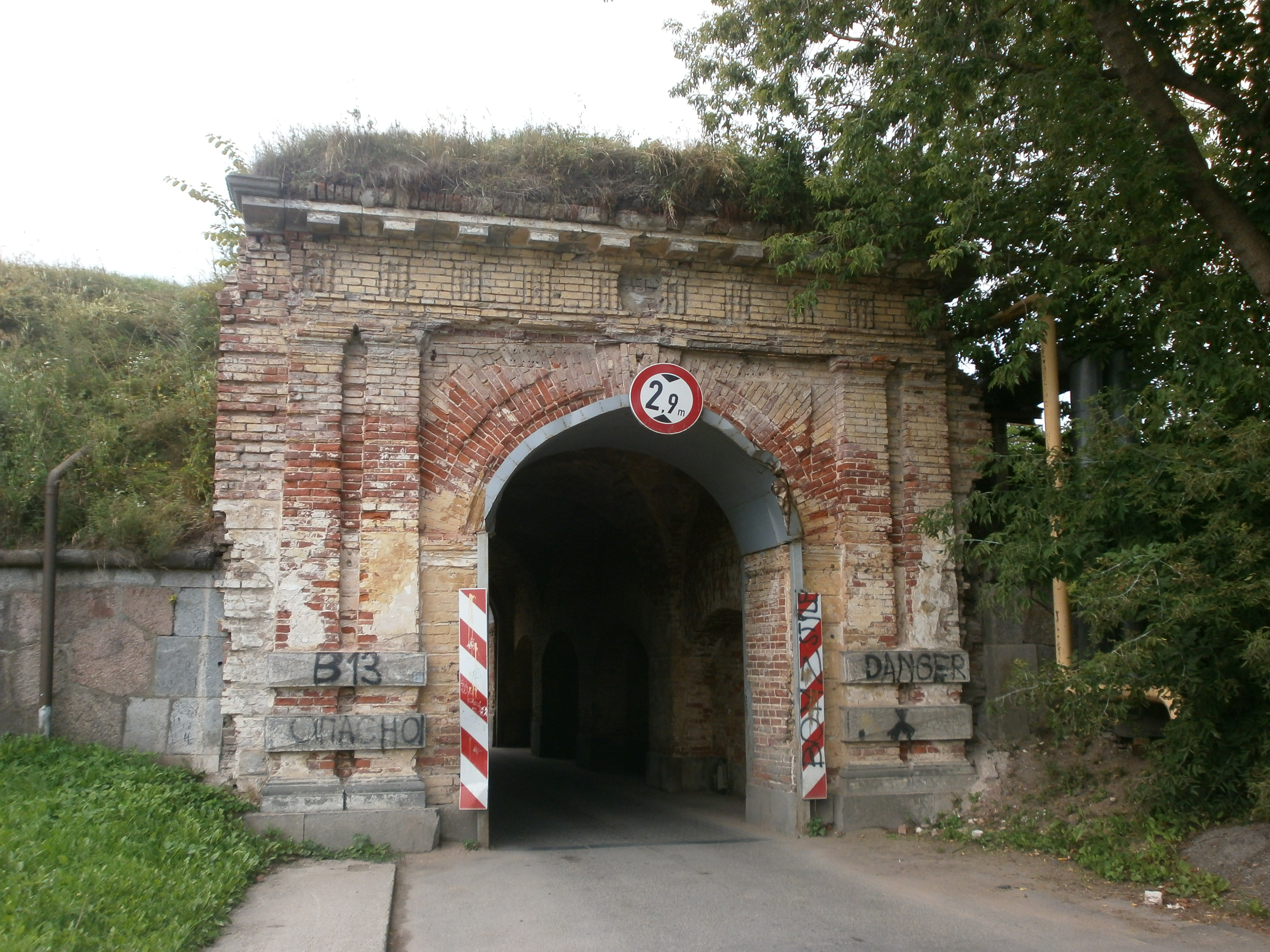 Aleksandra vārti Daugavpils cietoksnī